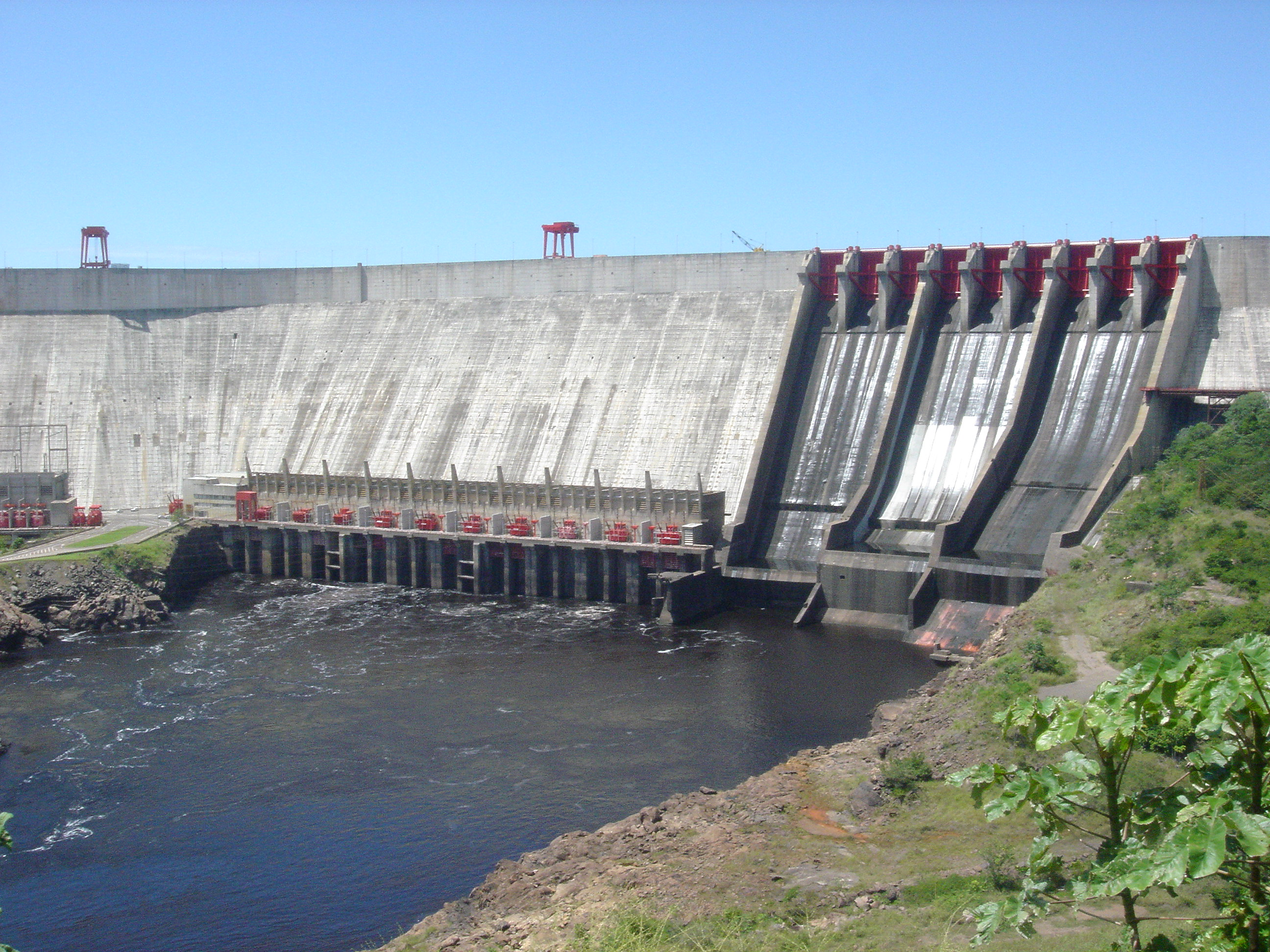 Guri Wasserkraftwerk